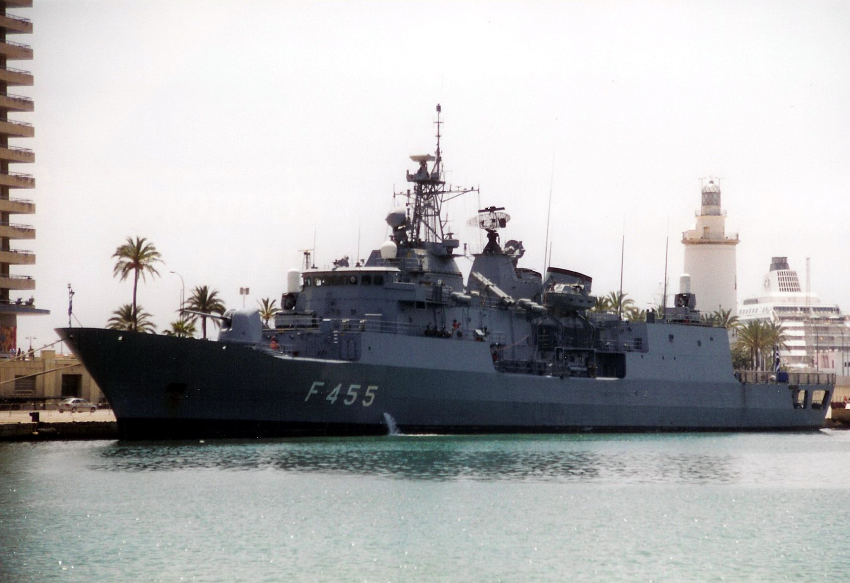 Grecian frigate Salamis